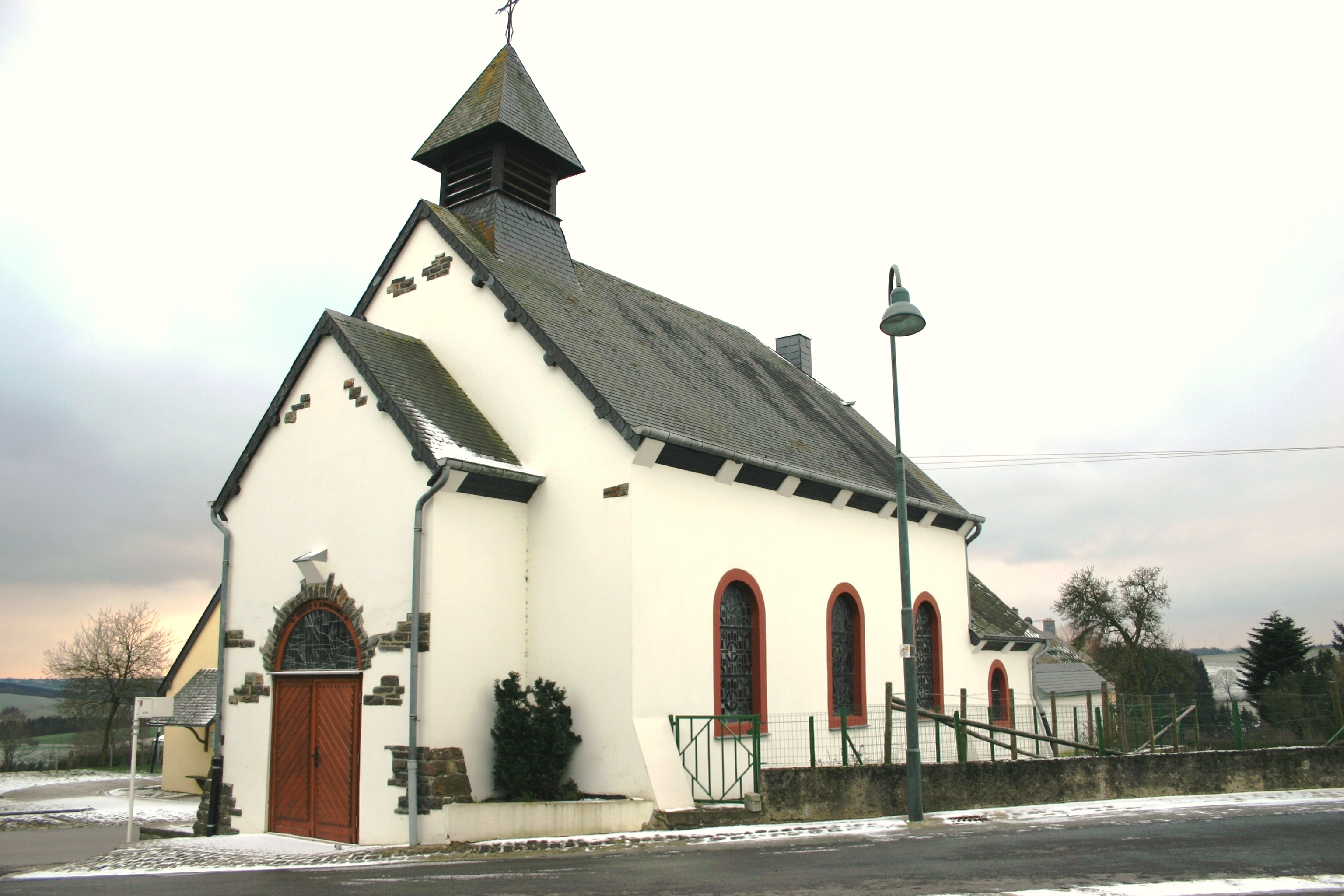 Appolonia-Kapell vu Kaalber Quell: Eege Foto les Meloures